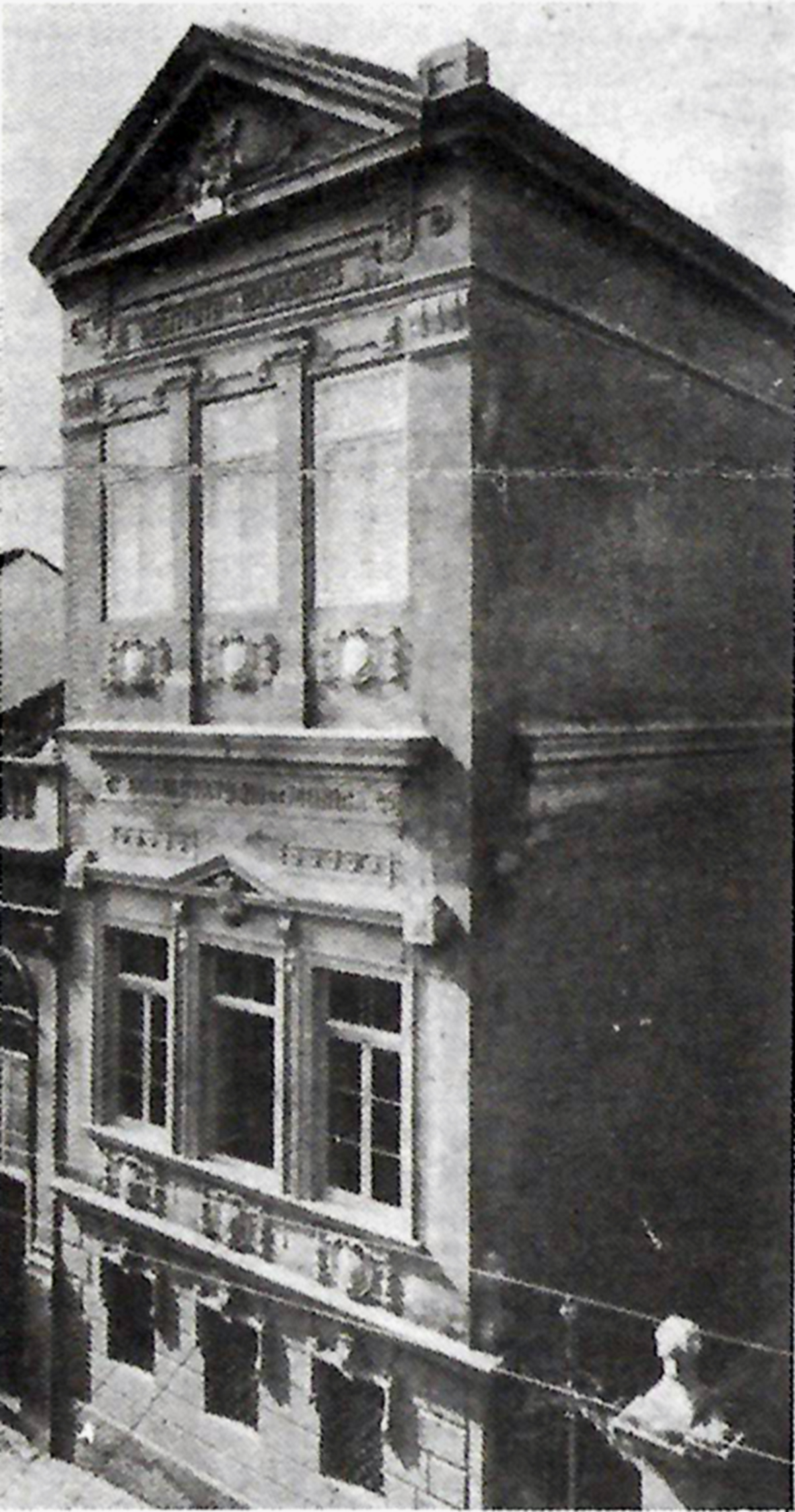 Antigo Instituto de Artes da UFRGS